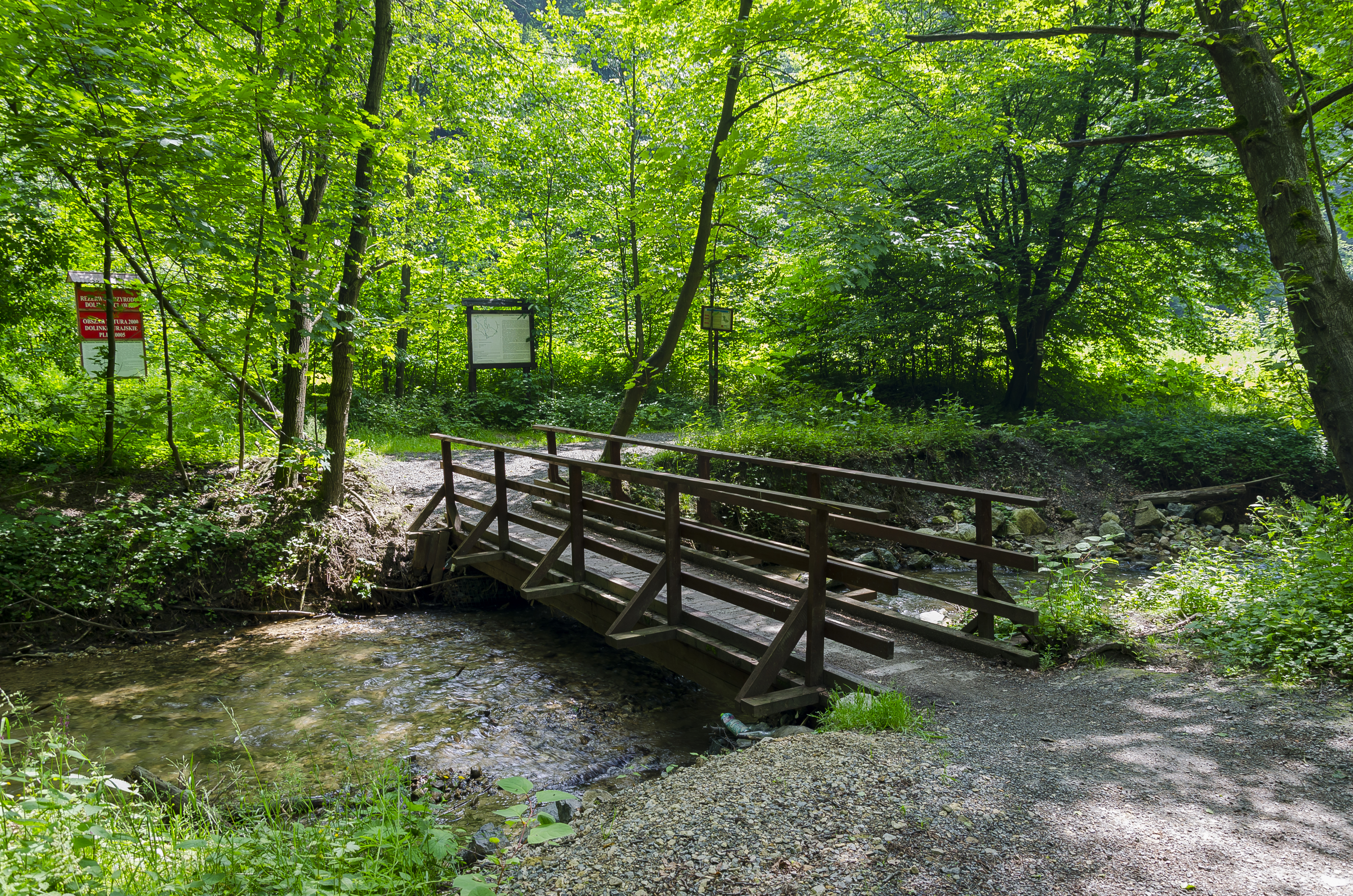 Dubie, Krzeszowice, Poland